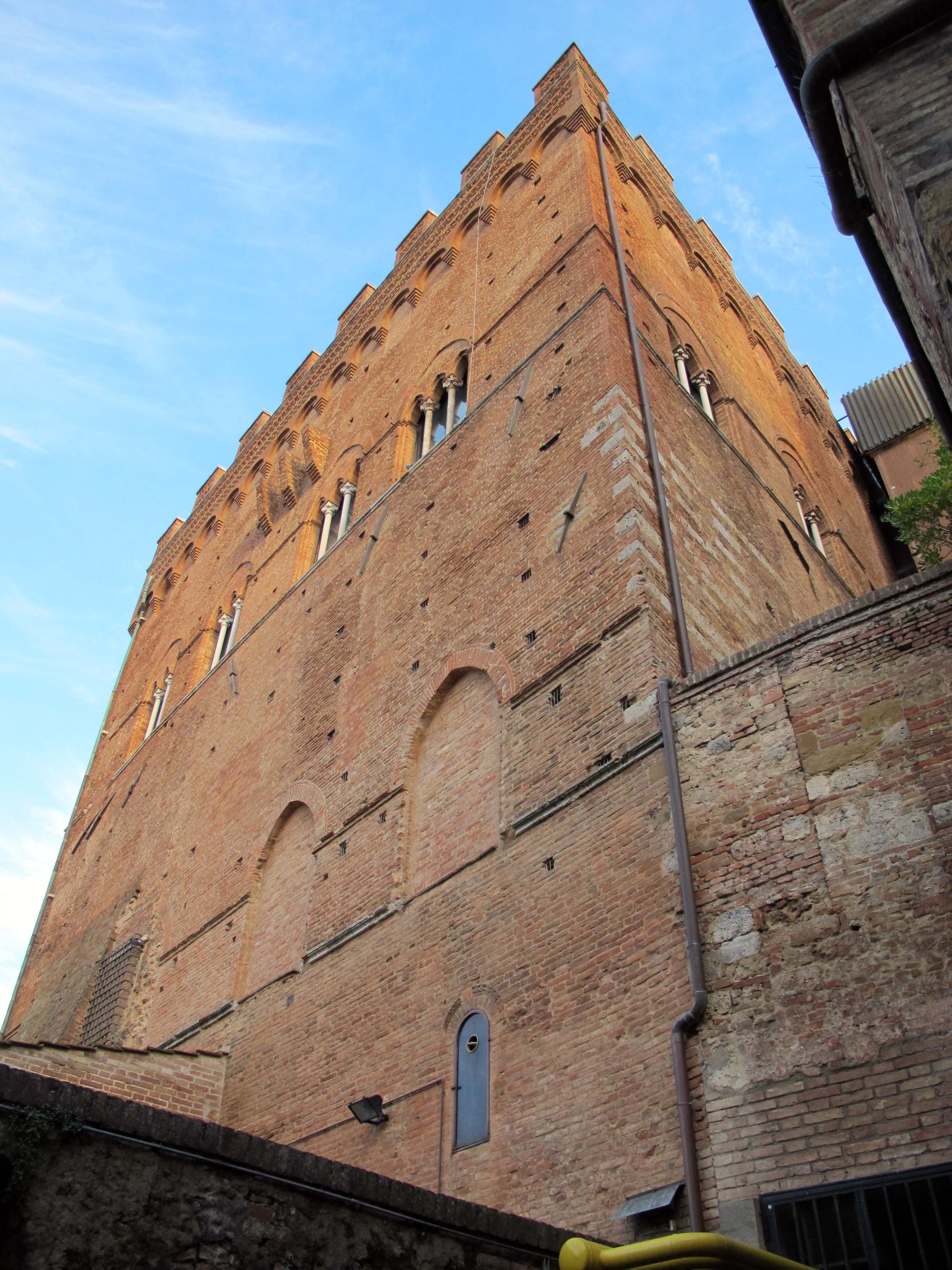 Banchi di Sotto e dintorni, Siena